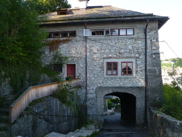 Kapuzinerberg - Felixpforte